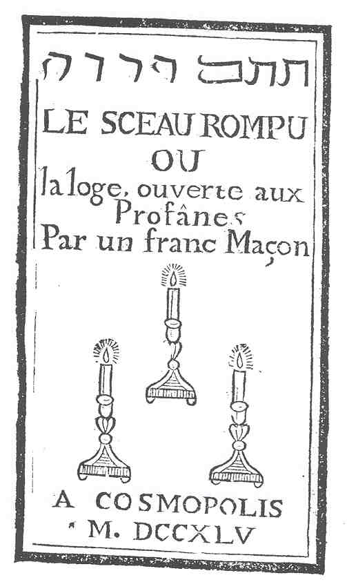 Frontispice du livre: LE SCEAU ROMPU OU la loge, ouverte aux Profânes. Par un franc Maçon A COSMOPOLIS M. DCCXLV